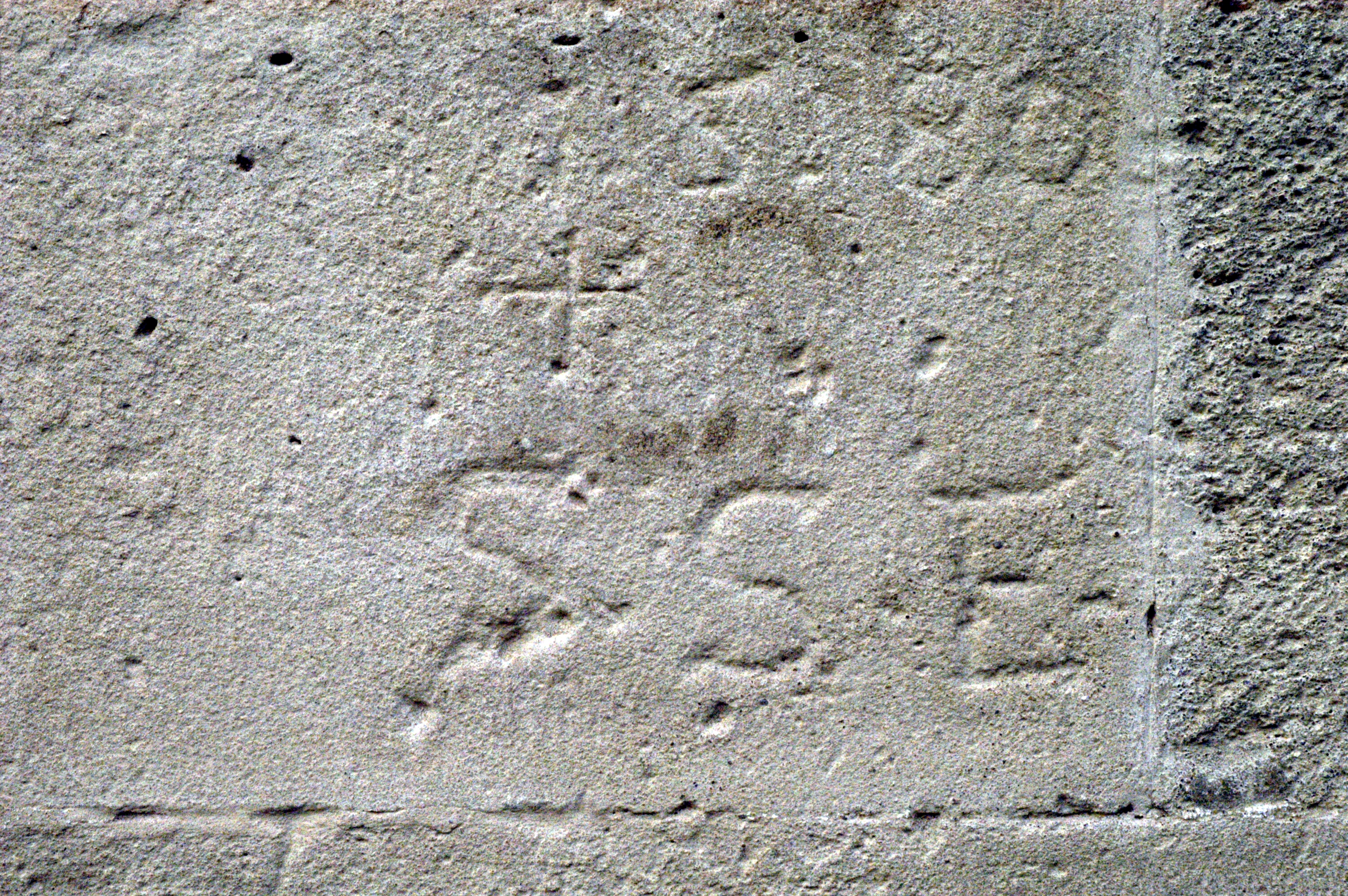 Katholische Pfarrkirche Maria Geburt in Schöngrabern, Gemeinde Grabern - Inschrift auf einem Quader an der Ostfassade der Apsis